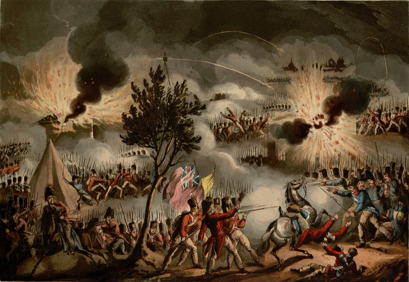 Fait partie d'un volume de gravures sur cuivre par T. Sutherland et D. Havell réhaussées à l'aquarelle. Titre gravé illustré en n. et b. Chaque gravure est suivie d'un texte explicatif. + in fine : "Contents", and "Names of Subscribers to the Martial Achievements of Great Britain and her allies". Ancely, René (1876 - 1966). Possesseur